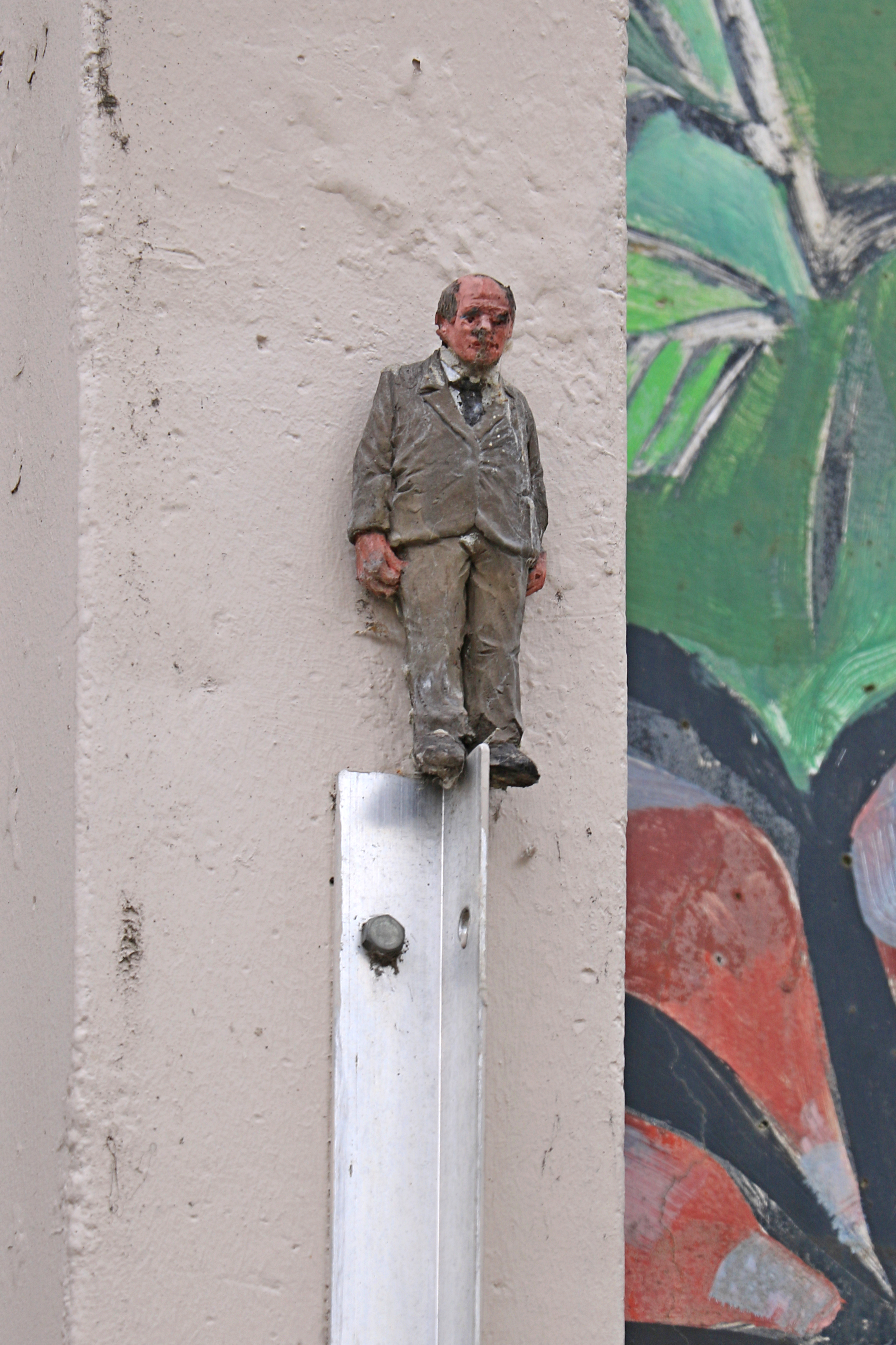 Belgique - Louvain-la-Neuve - statuette d'Isaac Cordal installée lors du Kosmopolite Art Tour 2015